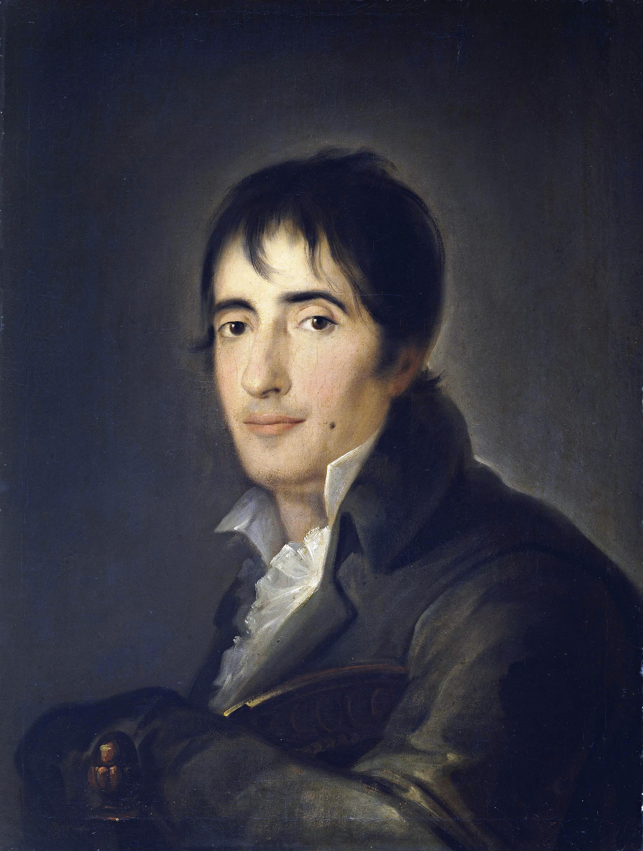 Retrato del poeta romántico español Manuel José Quintana (1772-1857). Esta obra fue donada en 1880 por Manuel José Quintana y Teresa Gómez y Rivas, que eran sobrinos del poeta, al Museo Iconográfico, para a continuación entrar a formar parte de la Galería de Españoles Ilustres.